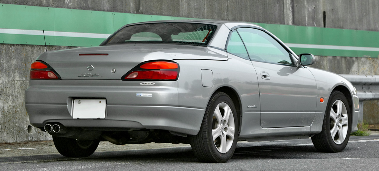 Nissan Silvia Convertible, Varietta.